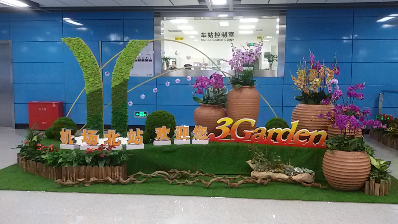 粵語: 廣州地鐵機場北站啲歡迎裝飾